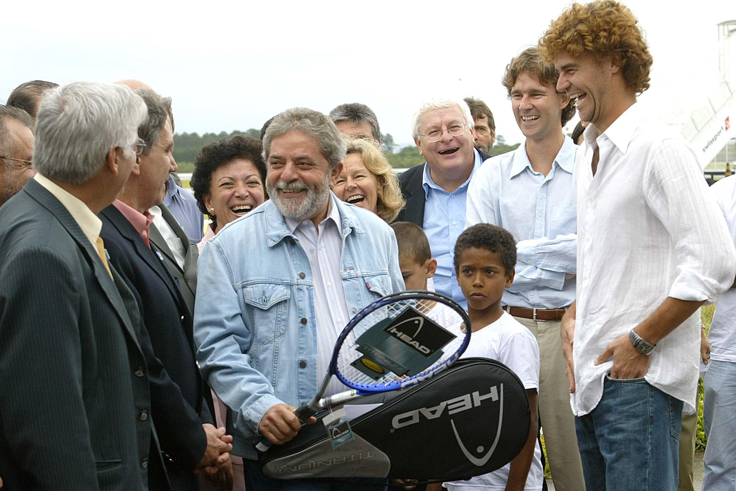 Florianópolis - Presidente Luiz Inácio Lula da Silva recebe uma raquete de presente do tenista Gustavo Kuerten, (Guga) na chegada ao aeroporto Hercílio Luz.